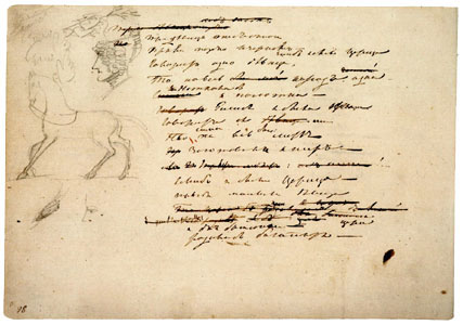 VII.1-11. Лошадь рядом с женским портретом карандаш «Сказка о царе Салтане...» (III, 1076—1077) июнь 1828